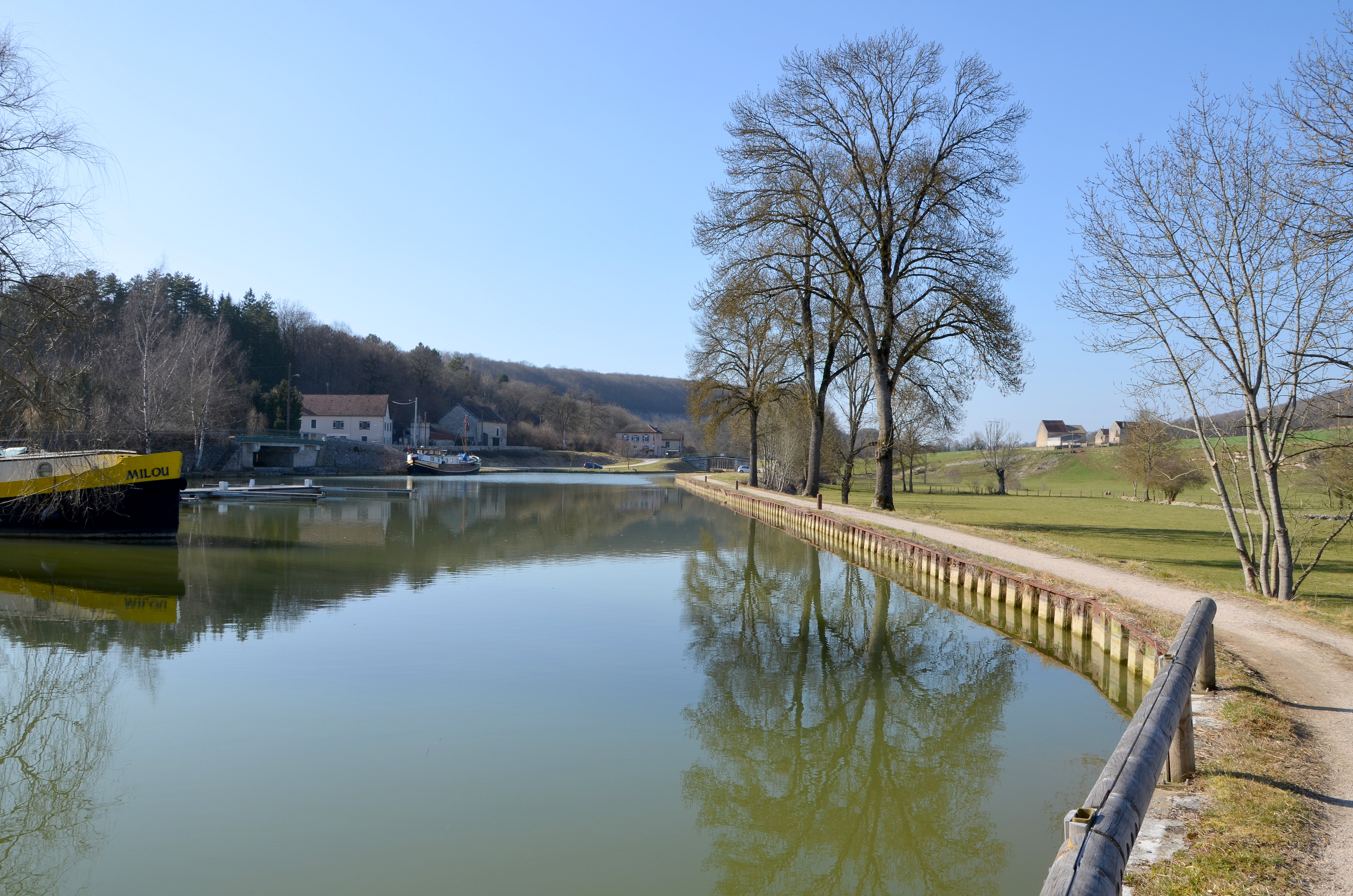 Canal de Bourgogne au Pont d'Ouche , Cote d'Or, Bourgogne, France